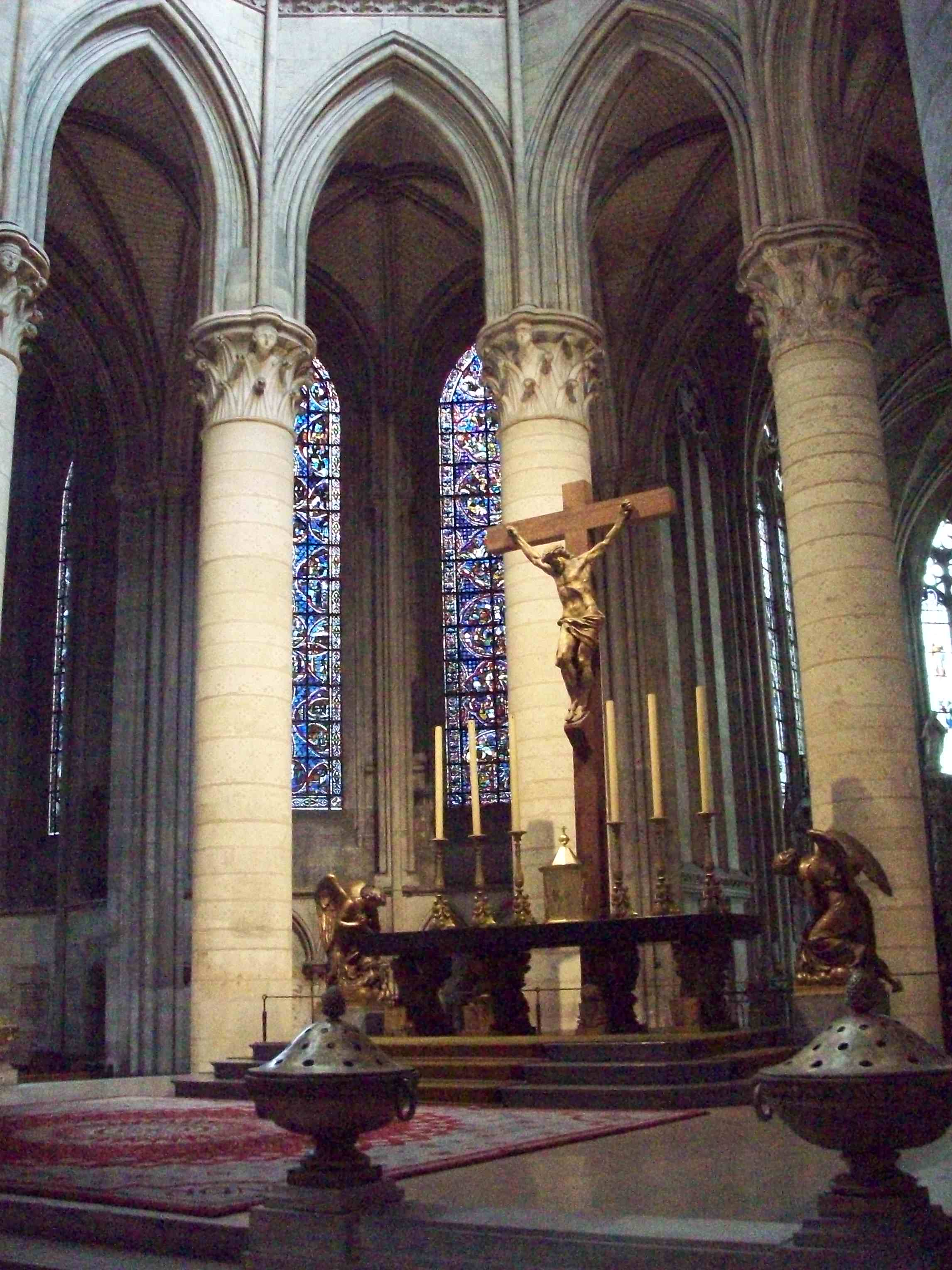 Vue du choeur de la cathédrale.